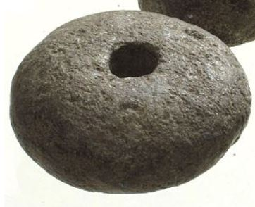 Fusaïole médiévale.